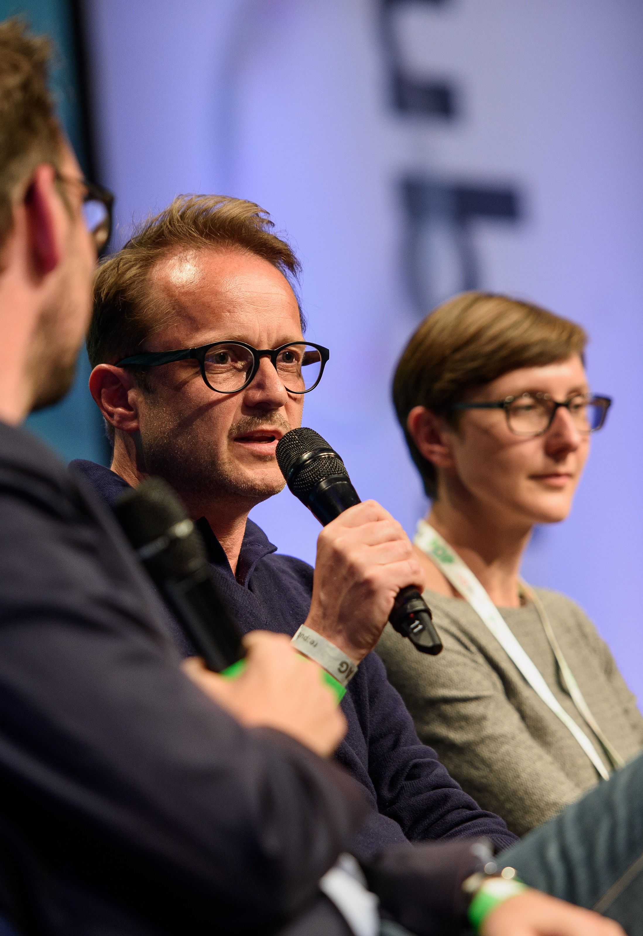 03.05.2018, Berlin: Discussion: Digitale Identität Speaker: Anika Meier, Rafael Horzon, Kristina Musholt, Kathrin Weßling, Andy Kassier Dirk von Gehlen Die re:publica ist eine der weltweit wichtigsten Konferenzen zu den Themen der digitalen Gesellschaft und findet in diesem Jahr vom 02. bis 04. Mai in der STATION-Berlin statt. Foto: Gregor Fischer/re:publica